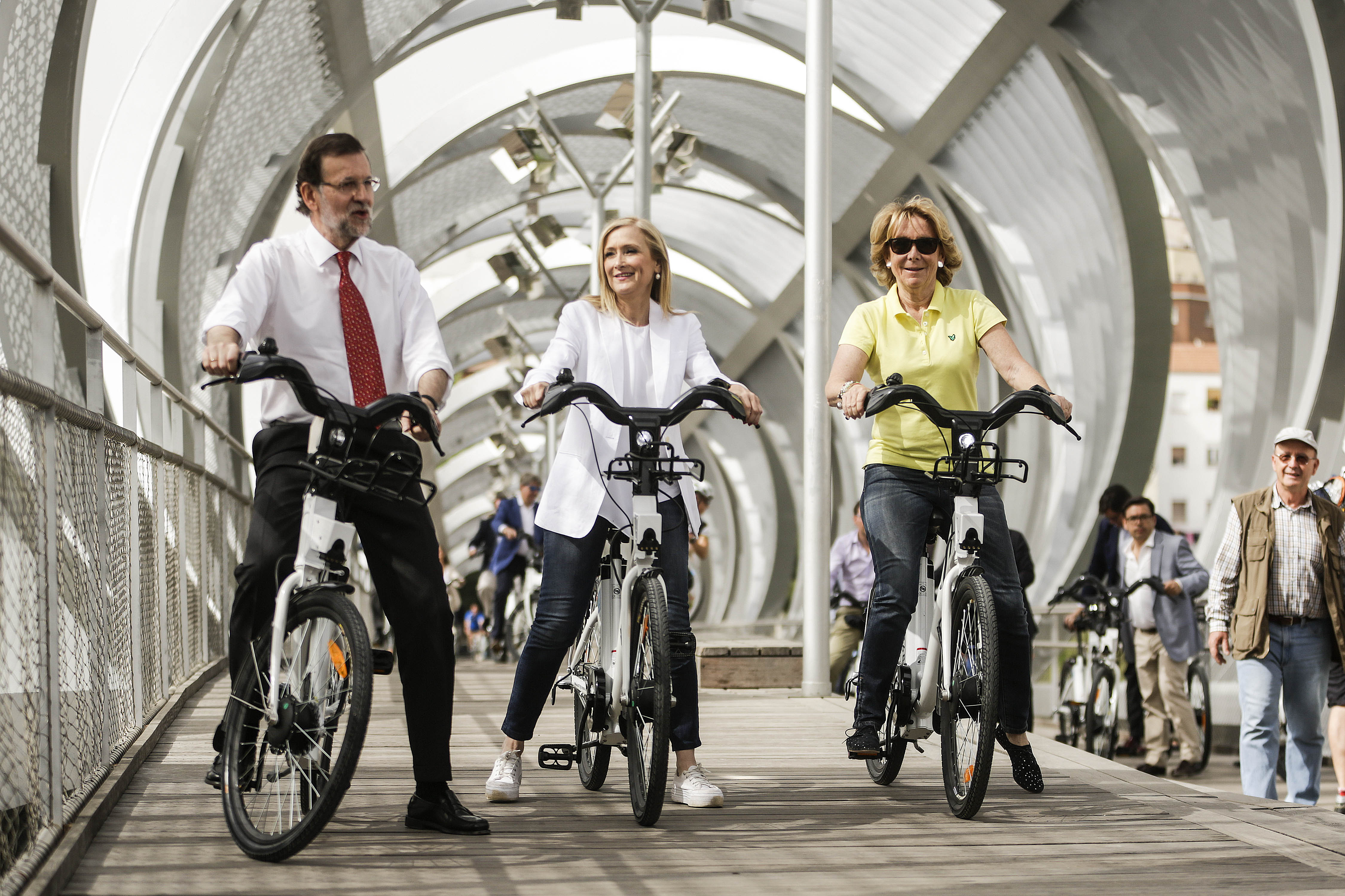 Paseo en bici por Madrid Río durante la campaña electoral de las municipales y autonómicas de 2015